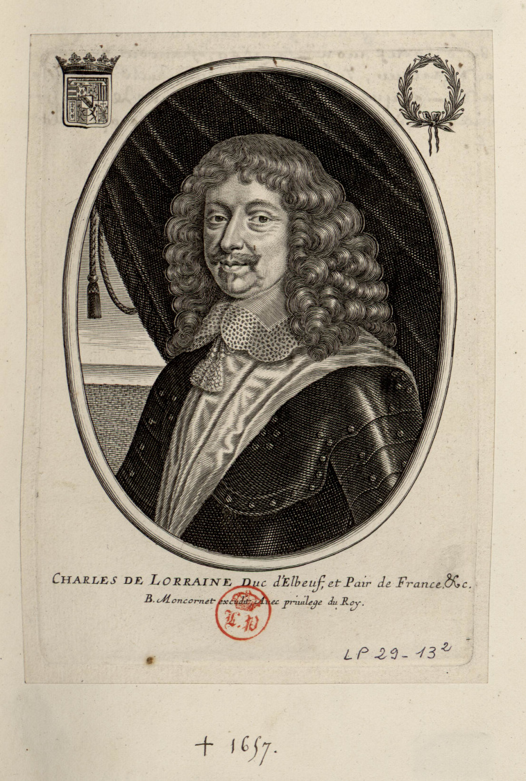 Charles II de Lorraine, duc d'Elbeuf Inscriptions marques : Lettre : "CHARLES DE LORRAINE Duc d'Elbeuf et Pair de France " Marque Louis-Philippe Historique : Cette estampe fait partie de la série de grands albums reliés contenant des portraits gravés et provenant du cabinet de gravures constitué par Louis-Philippe, duc d'Orléans puis roi des Français. La constitution des albums s'est étendue pendant plus de vingt-cinq ans et était conservée au Palais-Royal. Sur les 114 volumes dont on garde la trace, 75 sont aujourd'hui conservés à Versailles dont 65 seulement contiennent des gravures - près de 16 500. Les albums furent ensuite conservés au manoir d'Anjou, près de Bruxelles, dans la collection d'Henri d'Orléans comte de Paris, puis, lorsqu'en 1948 le prince et sa famille quittèrent la Belgique pour se fixer au Portugal, les volumes furent mis en vente publique à Bruxelles. A la demande de Charles Mauricheau-Beaupré, le comte de Paris accepta de retirer les volumes et les vendit au château de Versailles pour 1 200 000 Francs. Cf. Delalex Hélène, " La collection de portraits gravés de Louis-Philippe au château de Versailles ", Revue des Musées de France - Revue du Louvre, 2009.